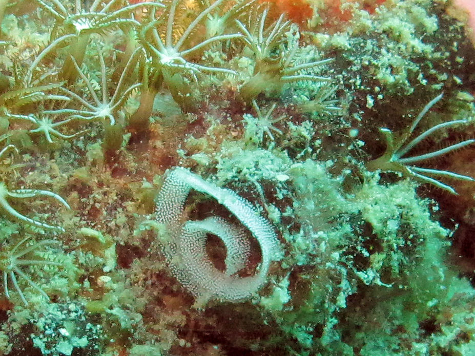 Dermatobranchus striatus, puesta de huevos en Koh Phangan, Tailandia